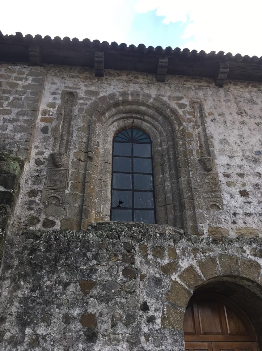 ventana